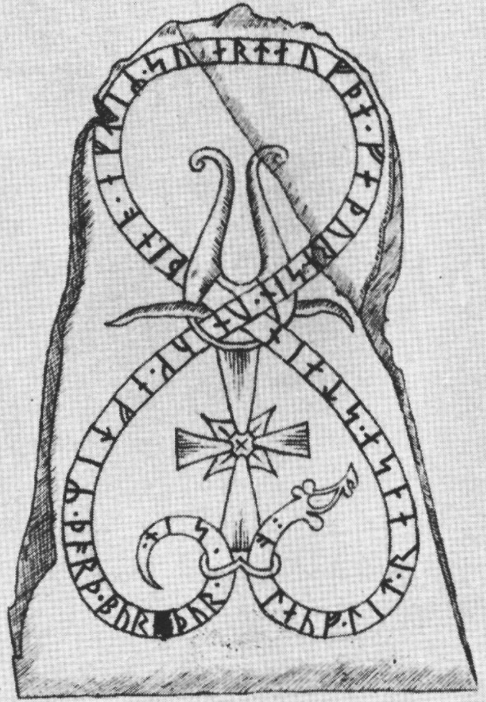 U 864. Vik, Balingsta sn. Efter teckning av Rhezelius